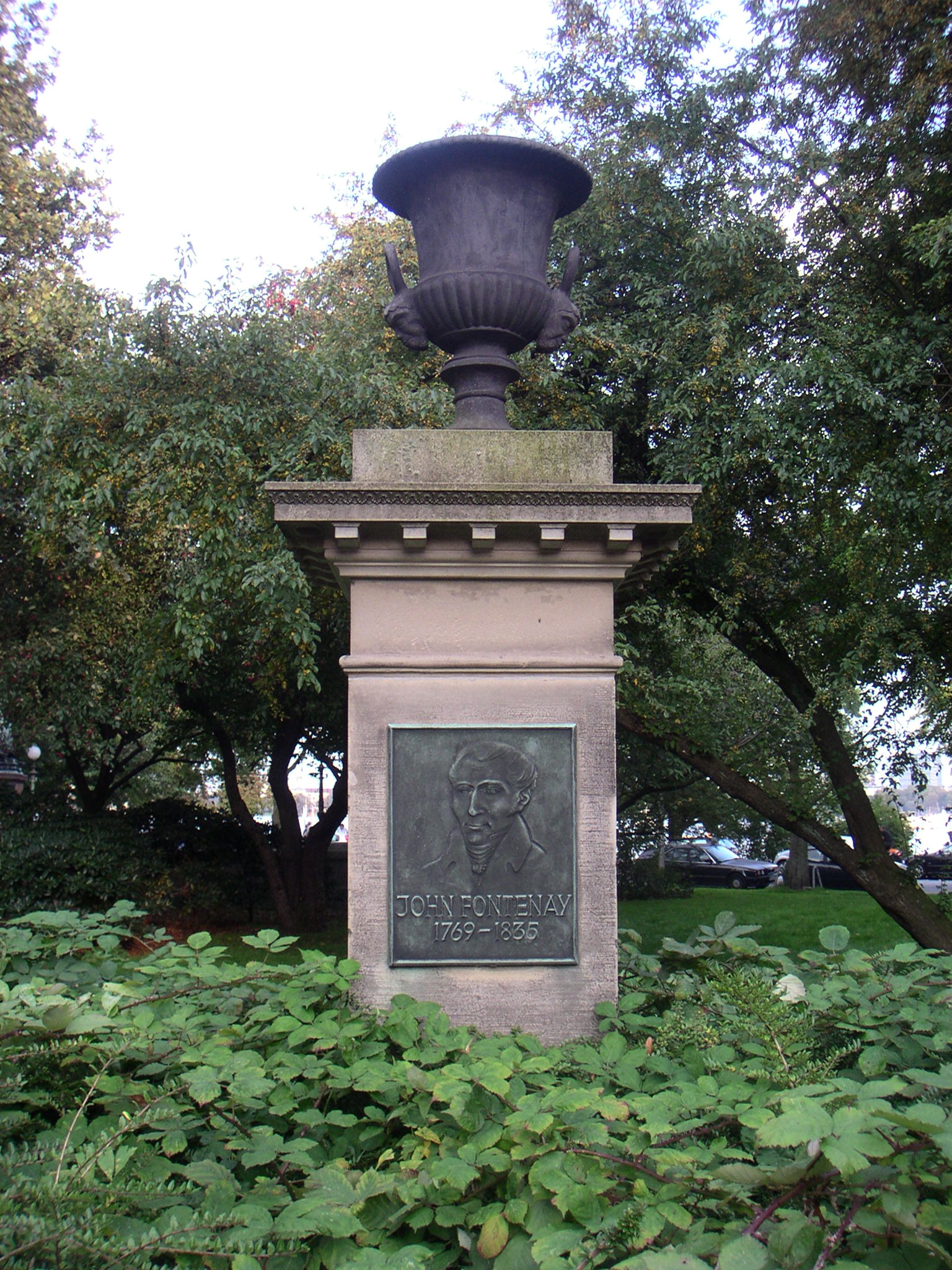 Gedenkstein für John Fontenay, Fontenay Ecke AlsteruferThis is a photograph of an architectural monument.